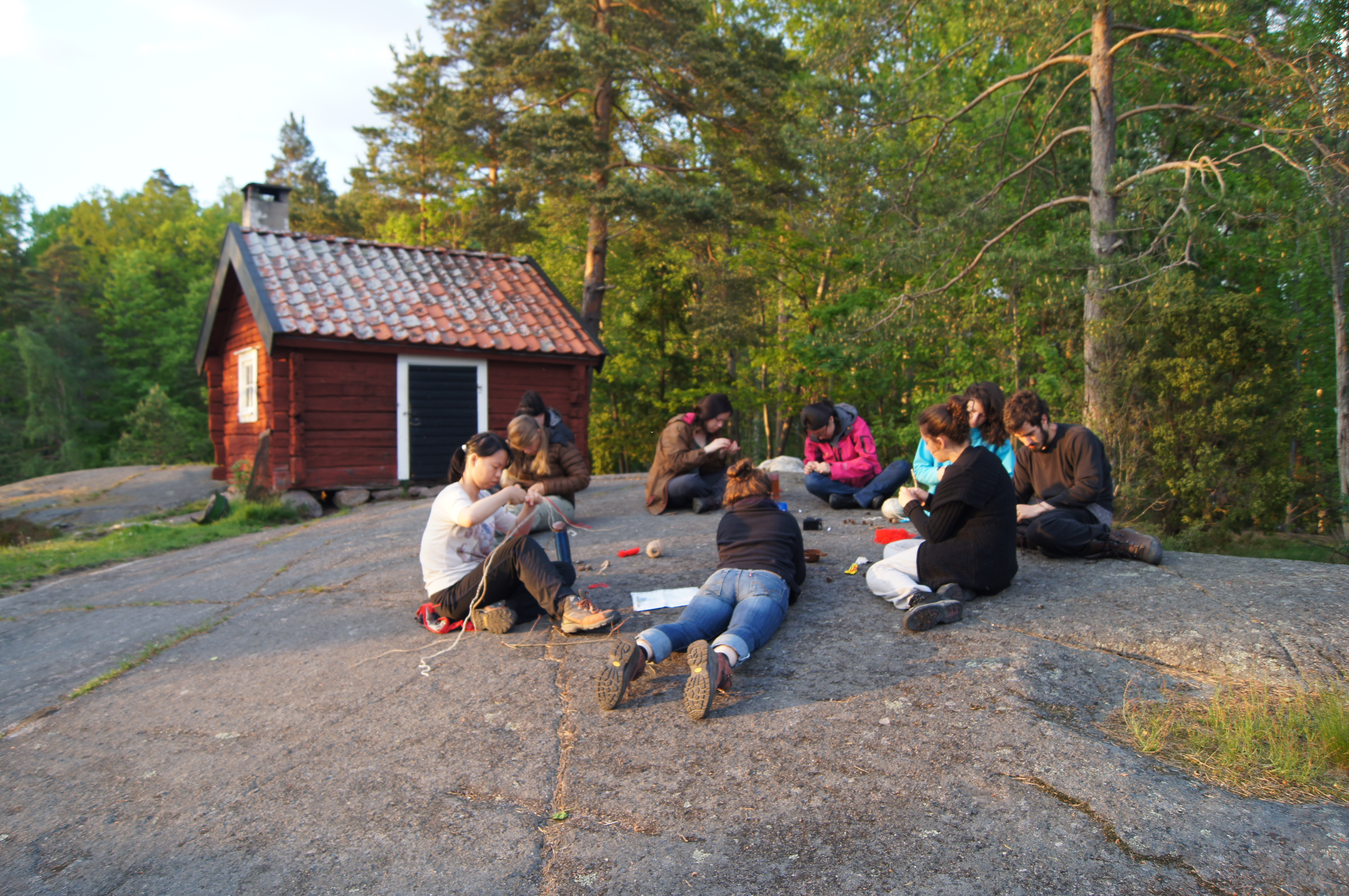 pedagogika na prostem, skupina, udeleženci, delavnice, ustvarjanje, učenje